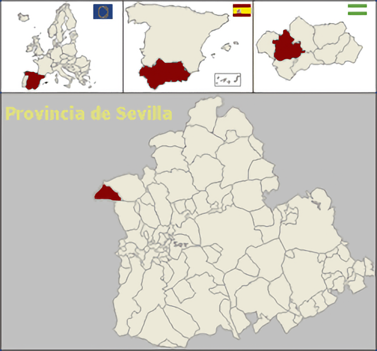 Situación de El Madroño, Sevilla, España